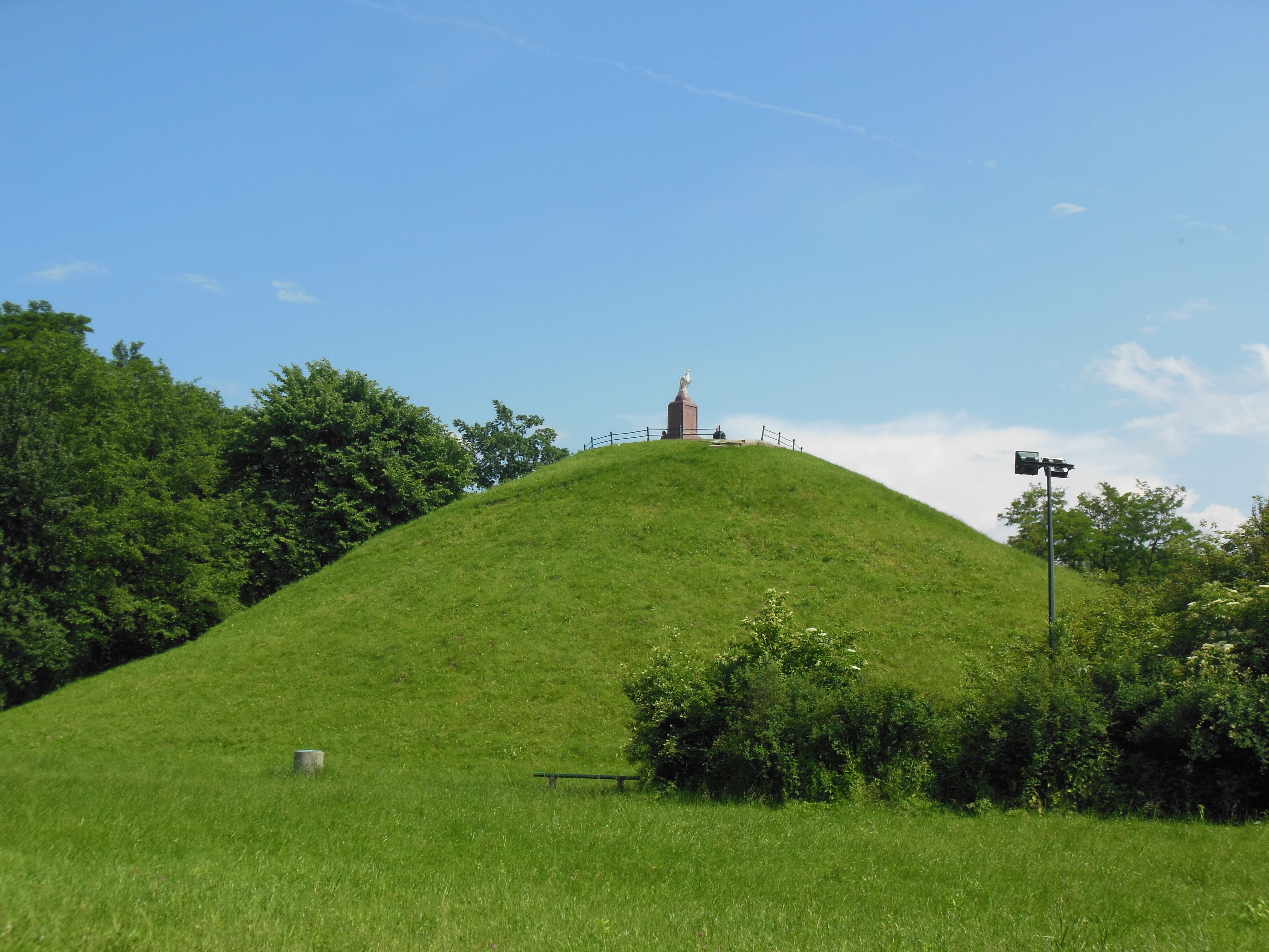 Kopiec Wandy, widok z północy, Mogiła, Nowa Huta, Kraków.